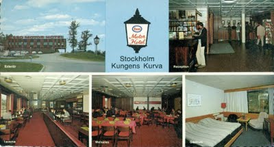 Esso Motorhotell Kungens Kurva (idag Scandic Hotel Kungens kurva)